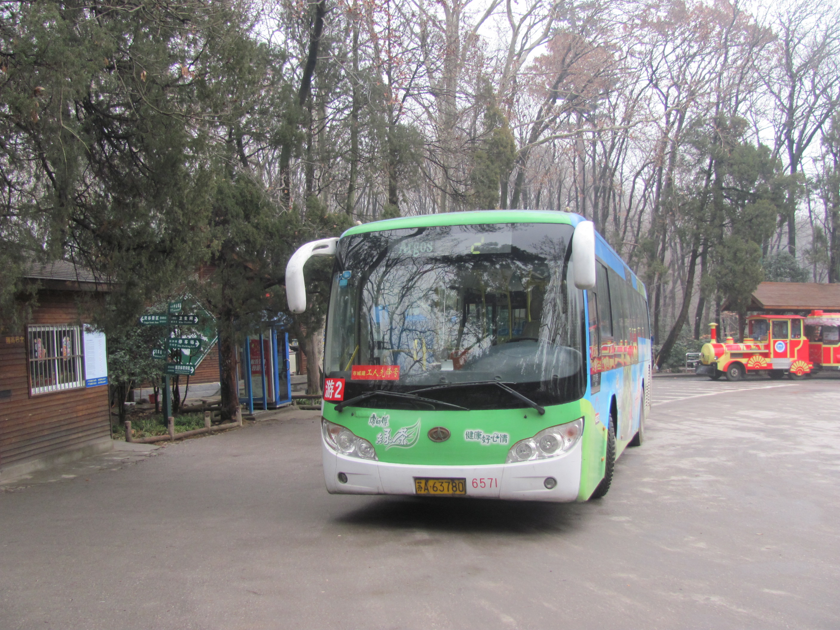 南京公交游2线